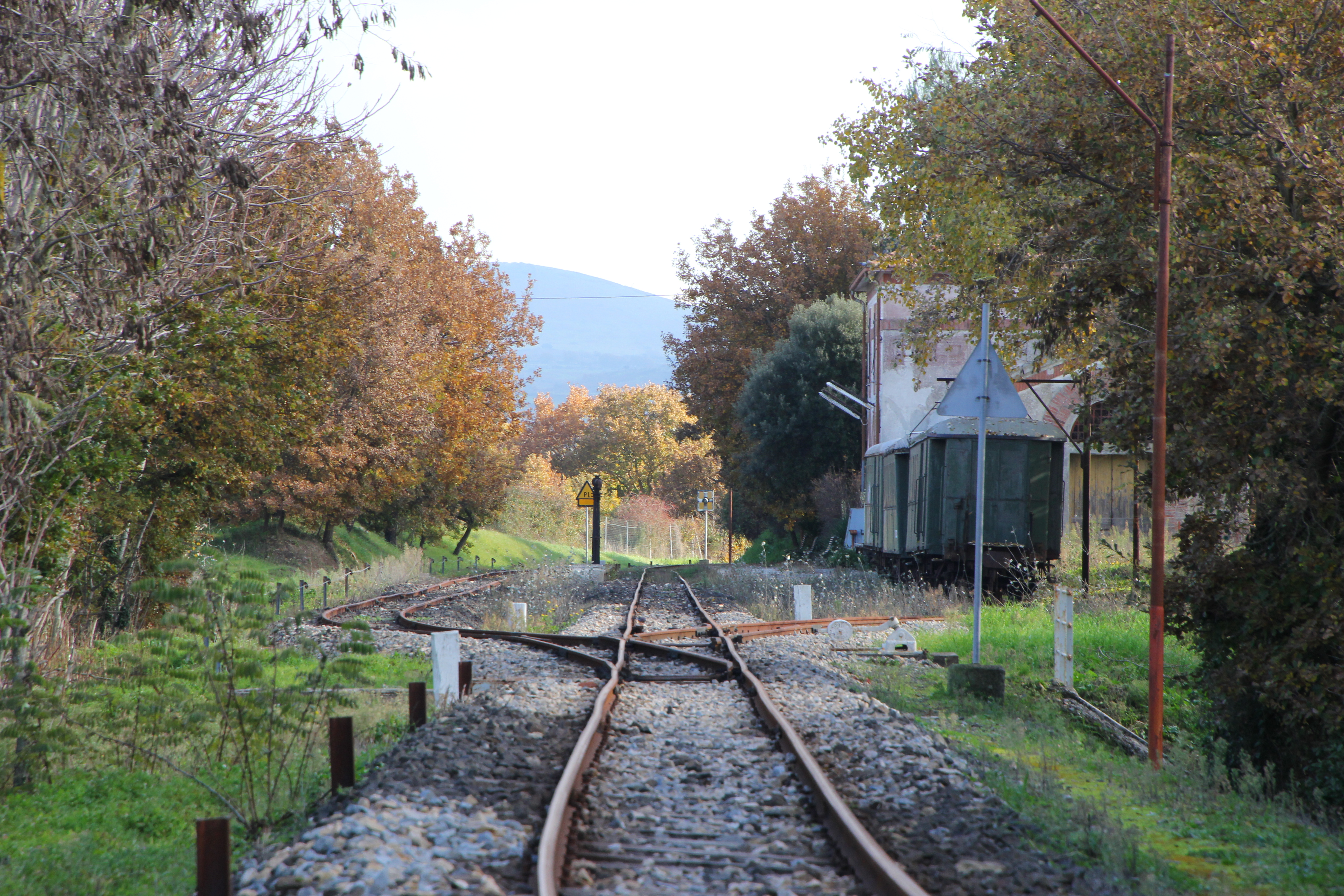 Osilo - Stazione ferroviaria